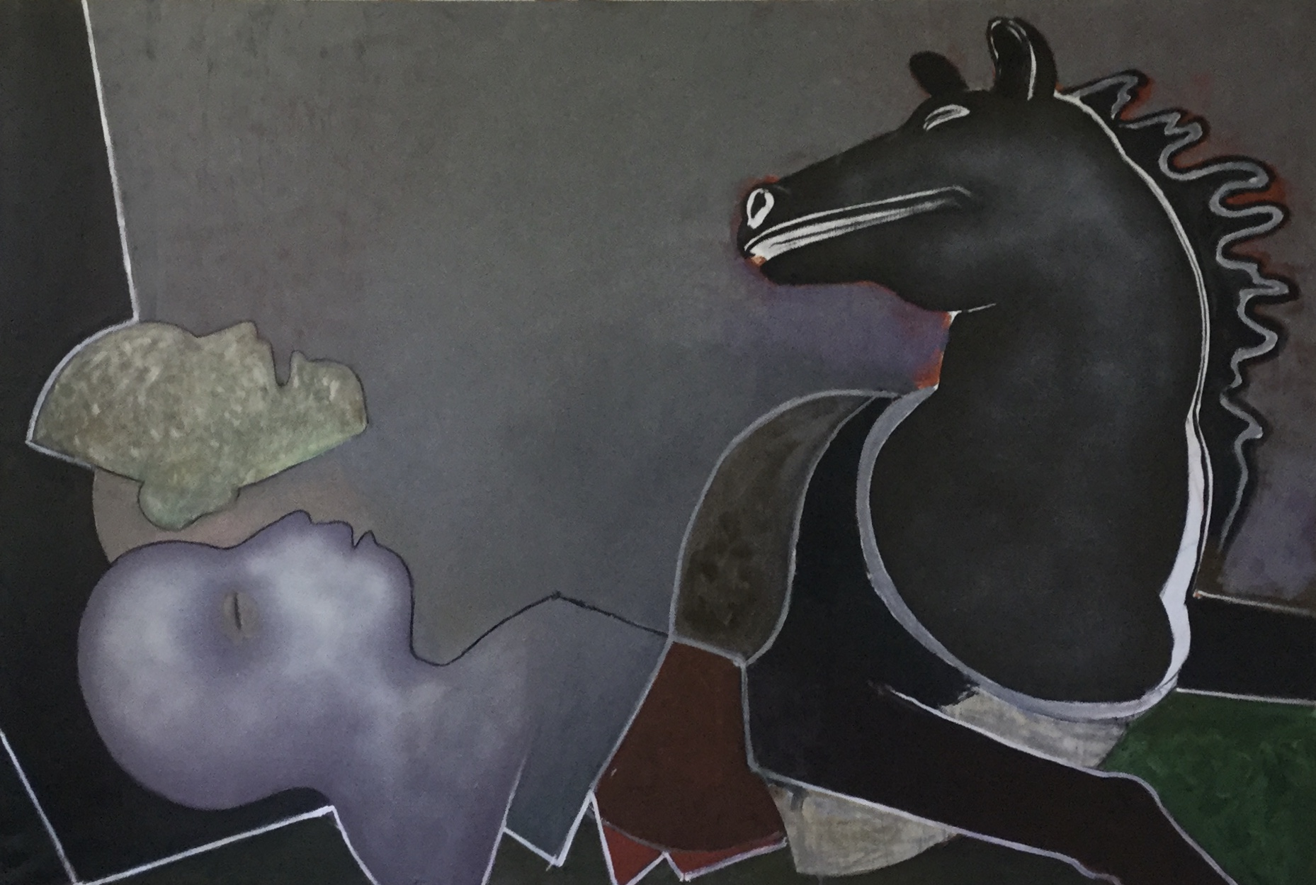 Maleri av den norske maleren Bjørn Krogstad: Jegeren drømmer (2017–2019). Akryl på lerret, 170 x 250cm